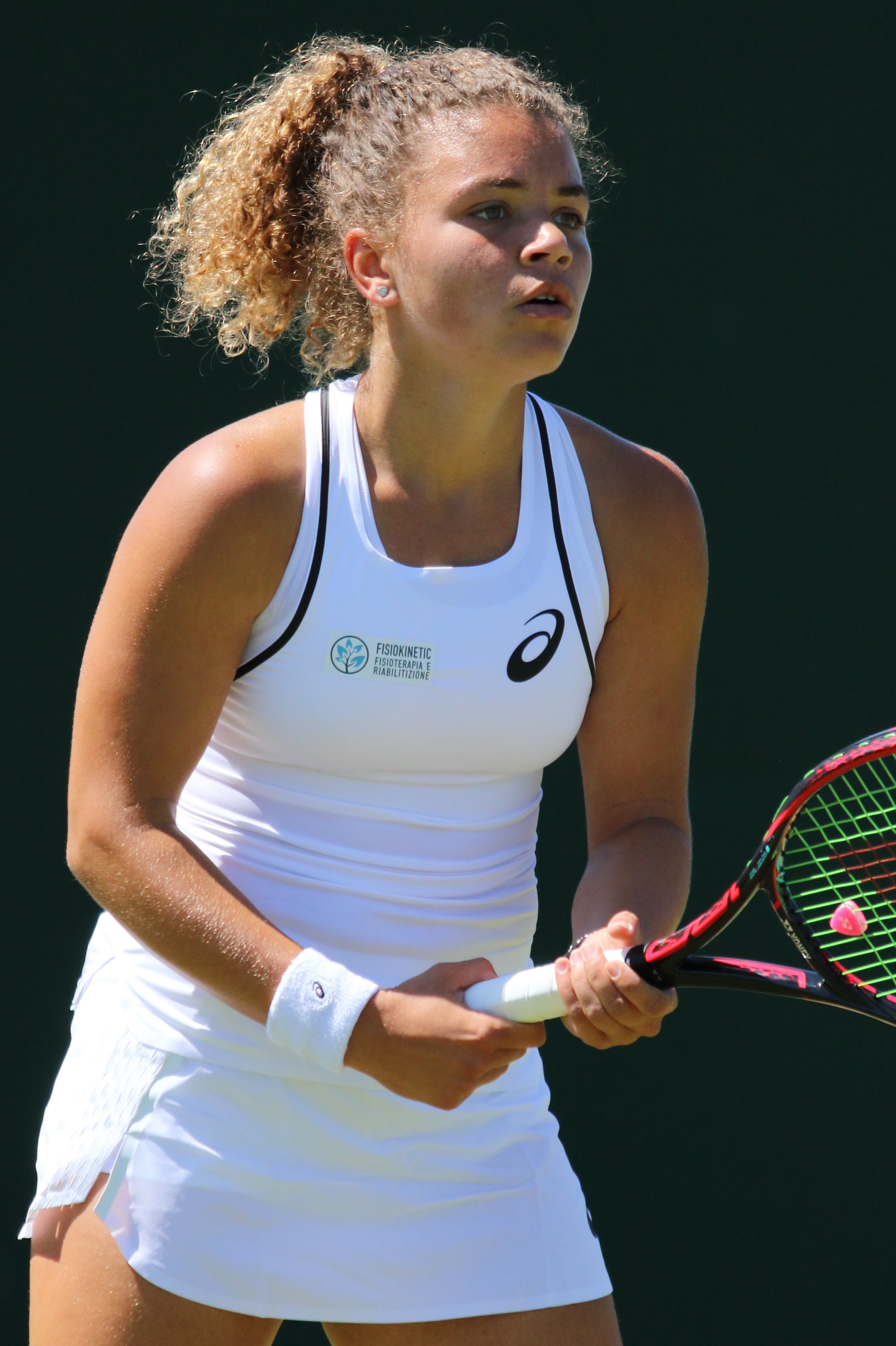 Paolini WMQ18 (19)